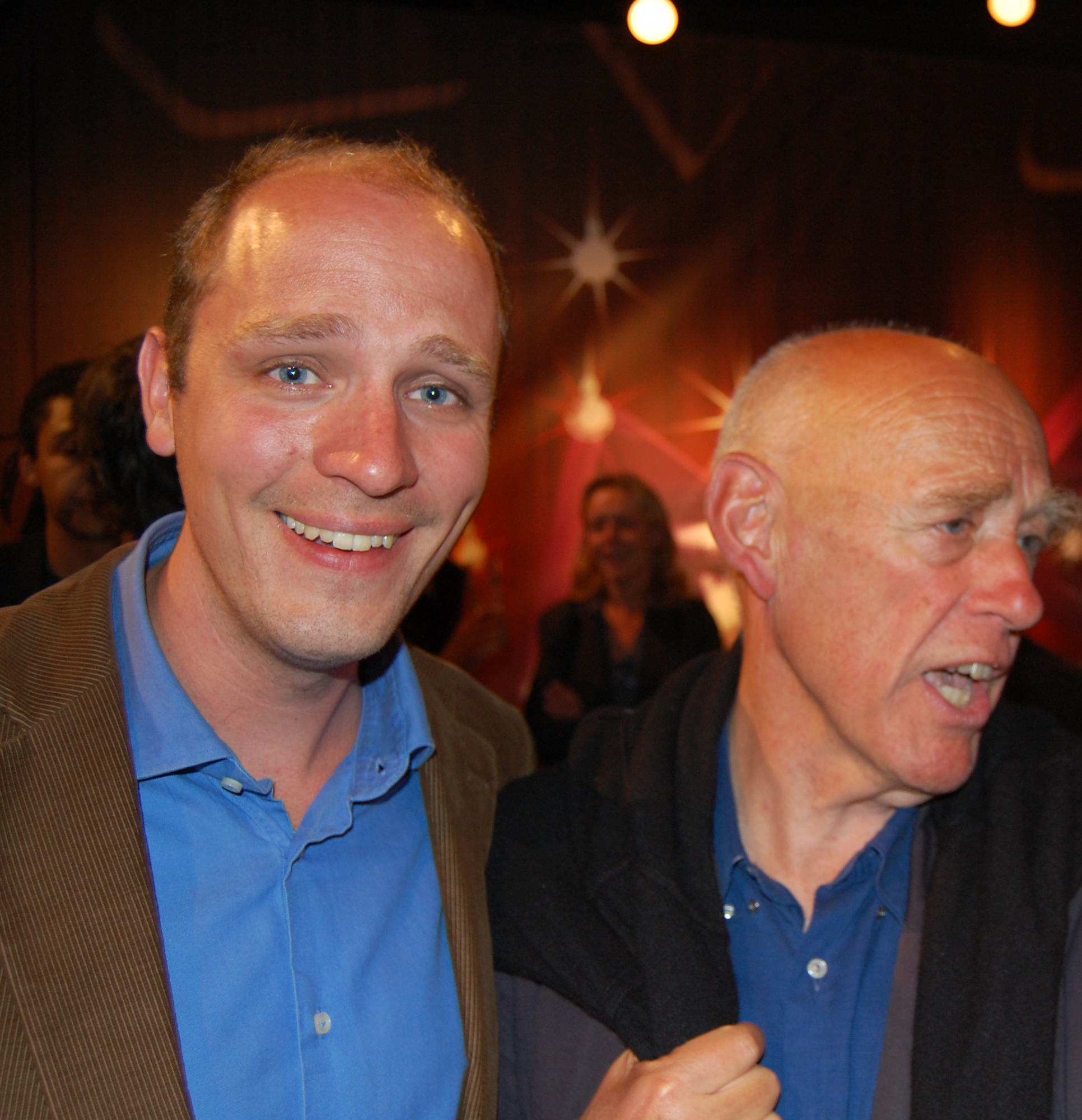 Juni 2009 ontving Jelle Brandt Corstius een Eervolle Vermelding van de Nipkowprijs-jury voor het VPRO-programma Van Moskou tot Magadan. Rechts vader Hugo Brandt Corstius. -- Jelle Brandt Corstius (Bloemendaal, 9 april 1978) is een Nederlands correspondent, publicist en televisiemaker. Hij is de zoon van schrijver Hugo Brandt Corstius en een broer van schrijfster Aaf Brandt Corstius.